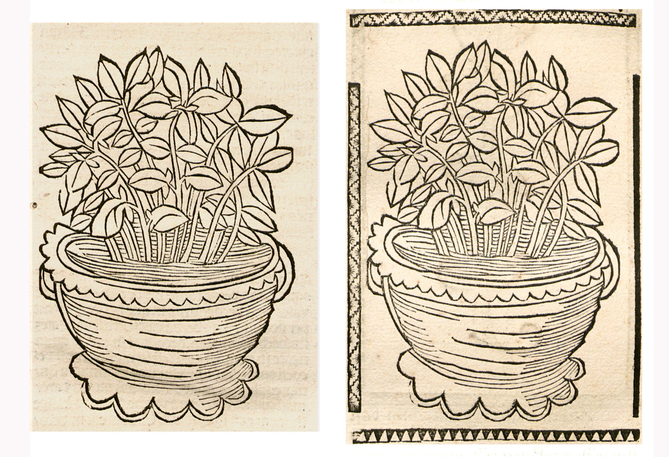 Abbildung von: Basilikum